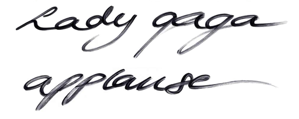 Logotipo del sencillo de Lady Gaga "Applause".